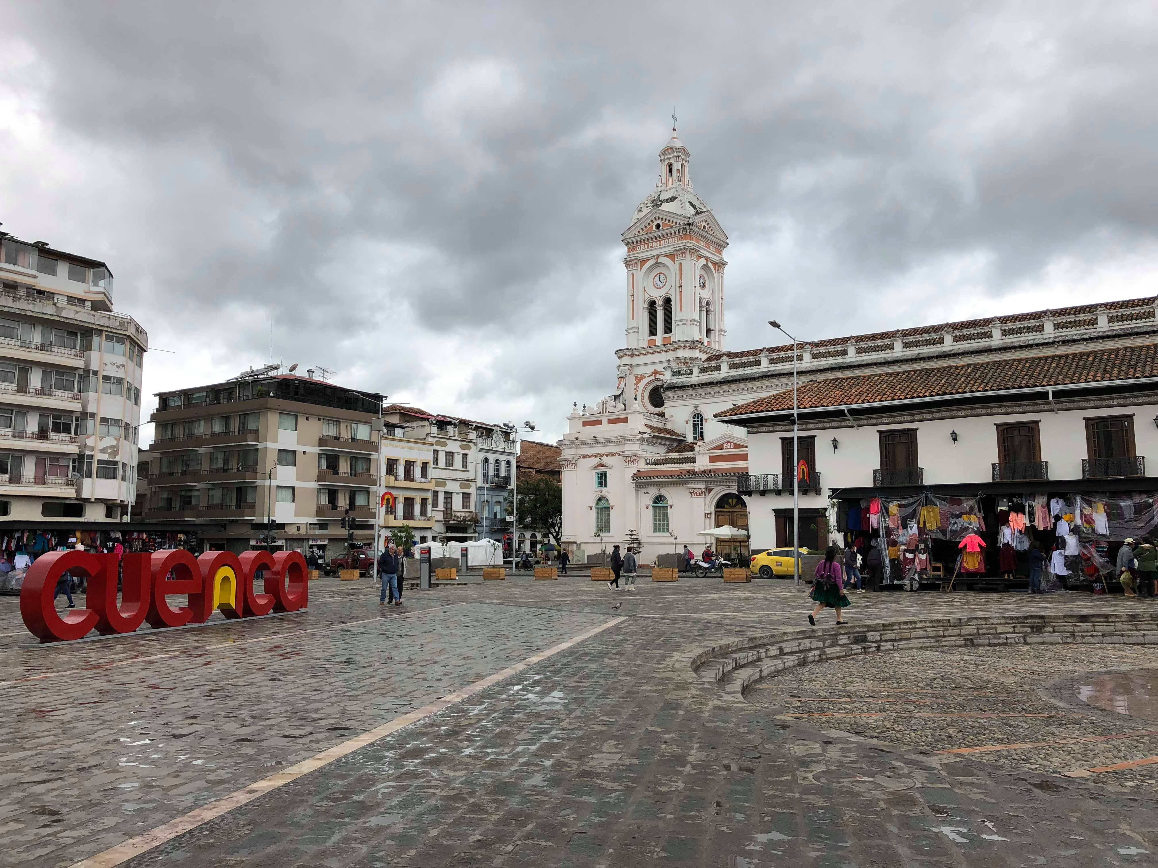 Plazoleta San Francisco remodelada y la Iglesia San Francisco